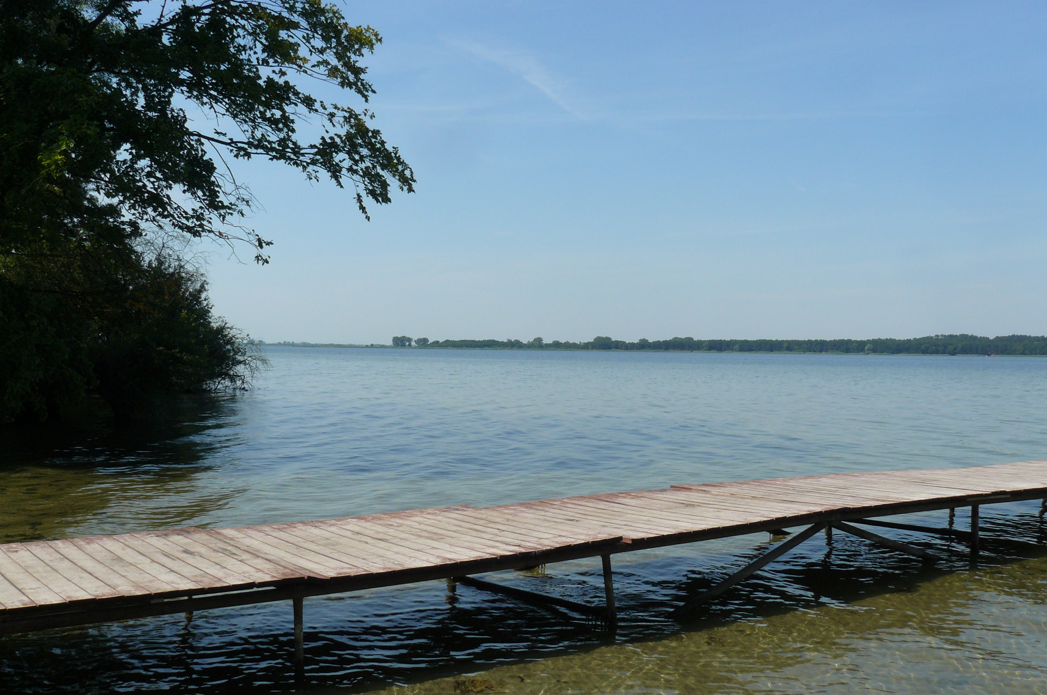 Jez. Miedwie z Koszewka.